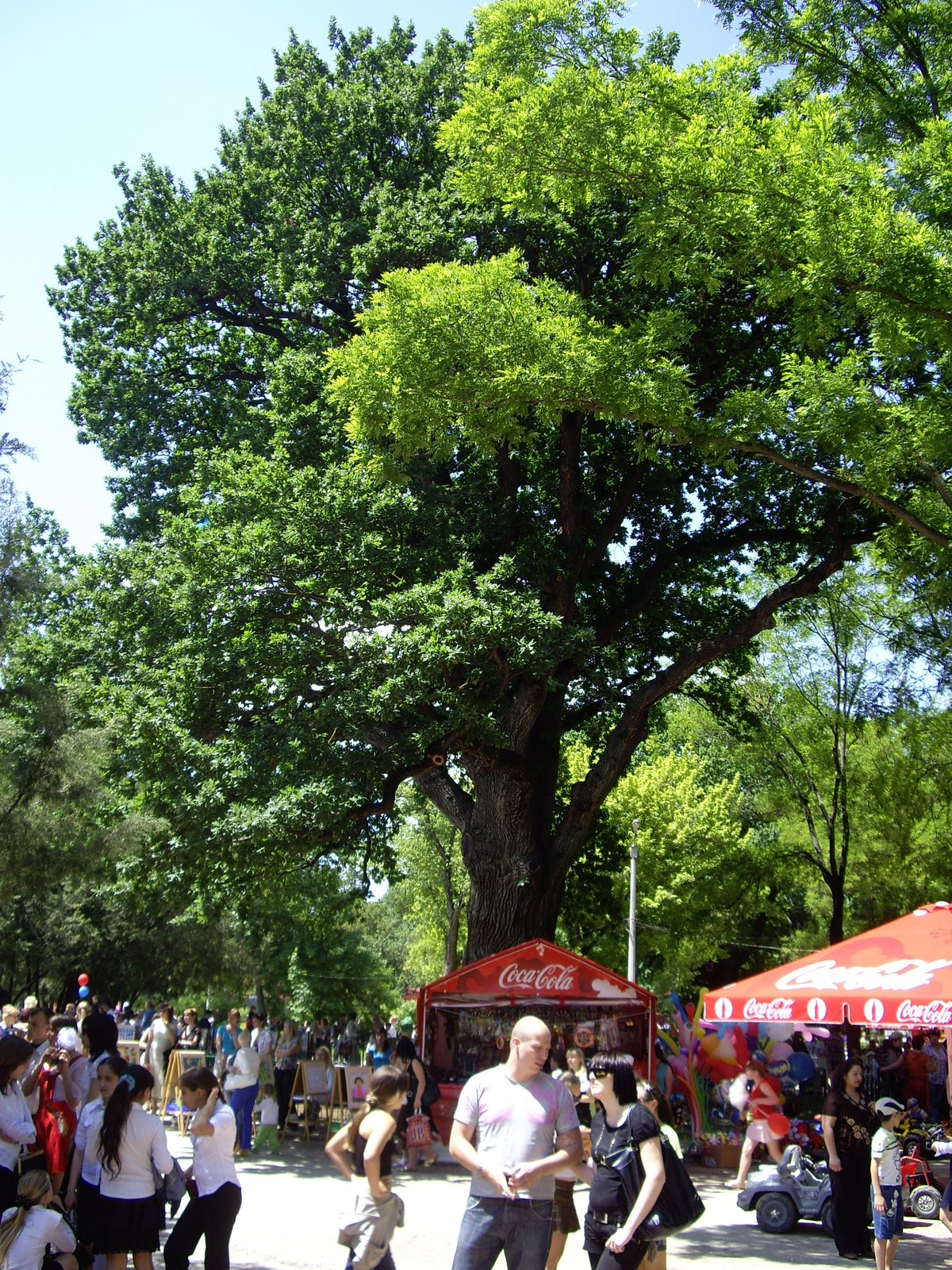 Дуб "Богатырь Тавриды" 650-750 лет.